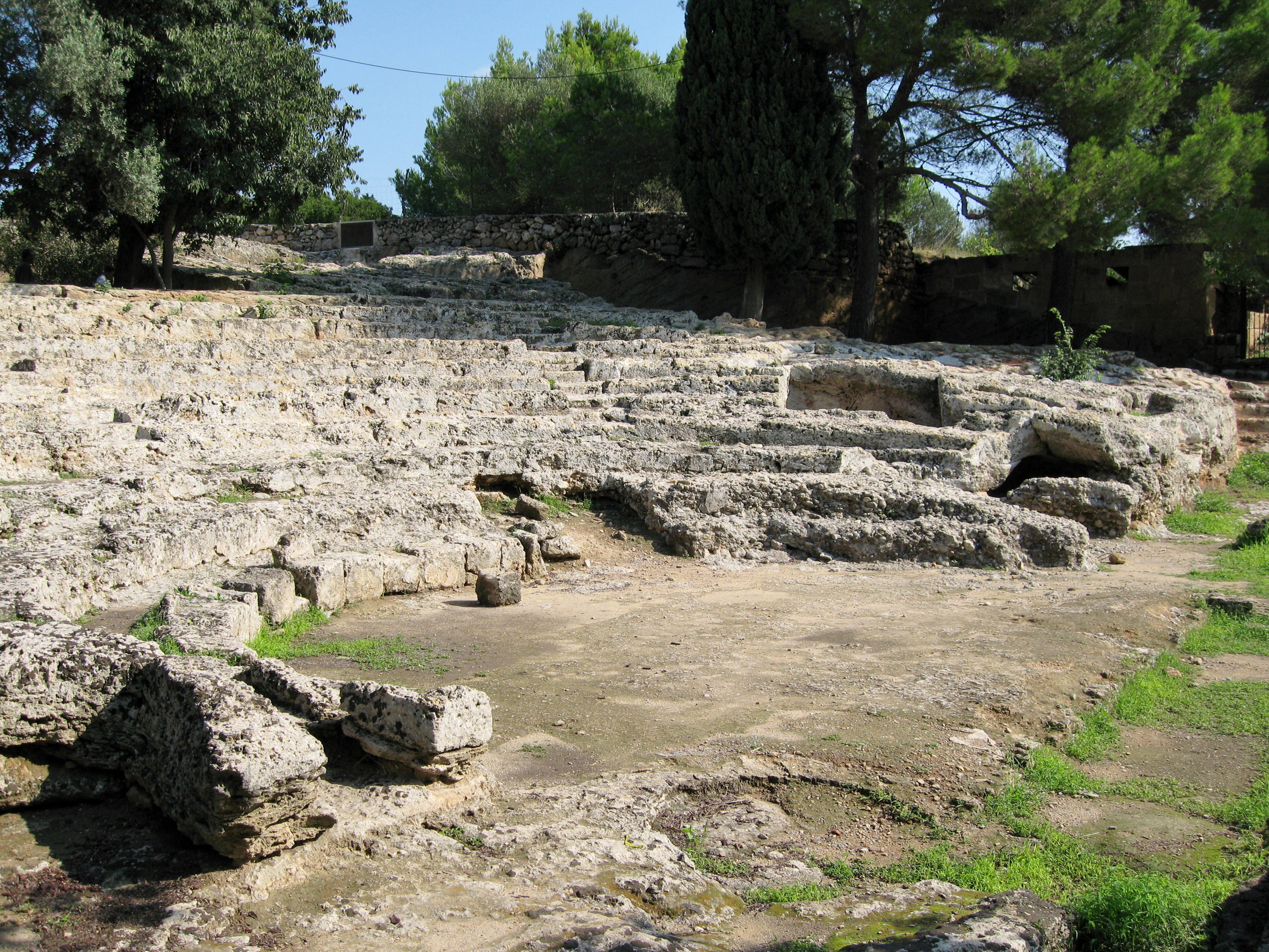 Ruinen des antiken römischen Theaters von Pollentia (katalanisch: Poŀlèntia), Gemeinde Alcúdia, Mallorca, Spanien